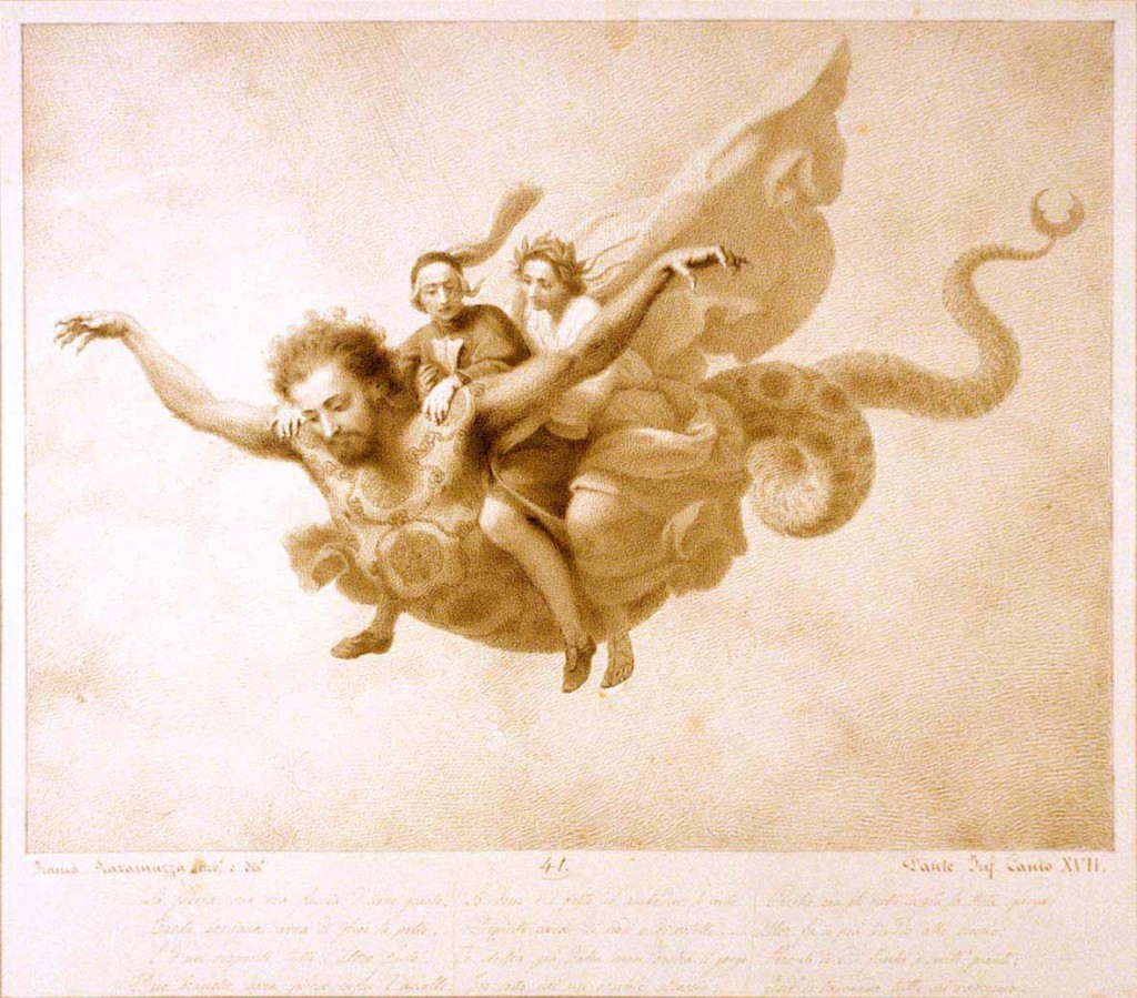 Gerione